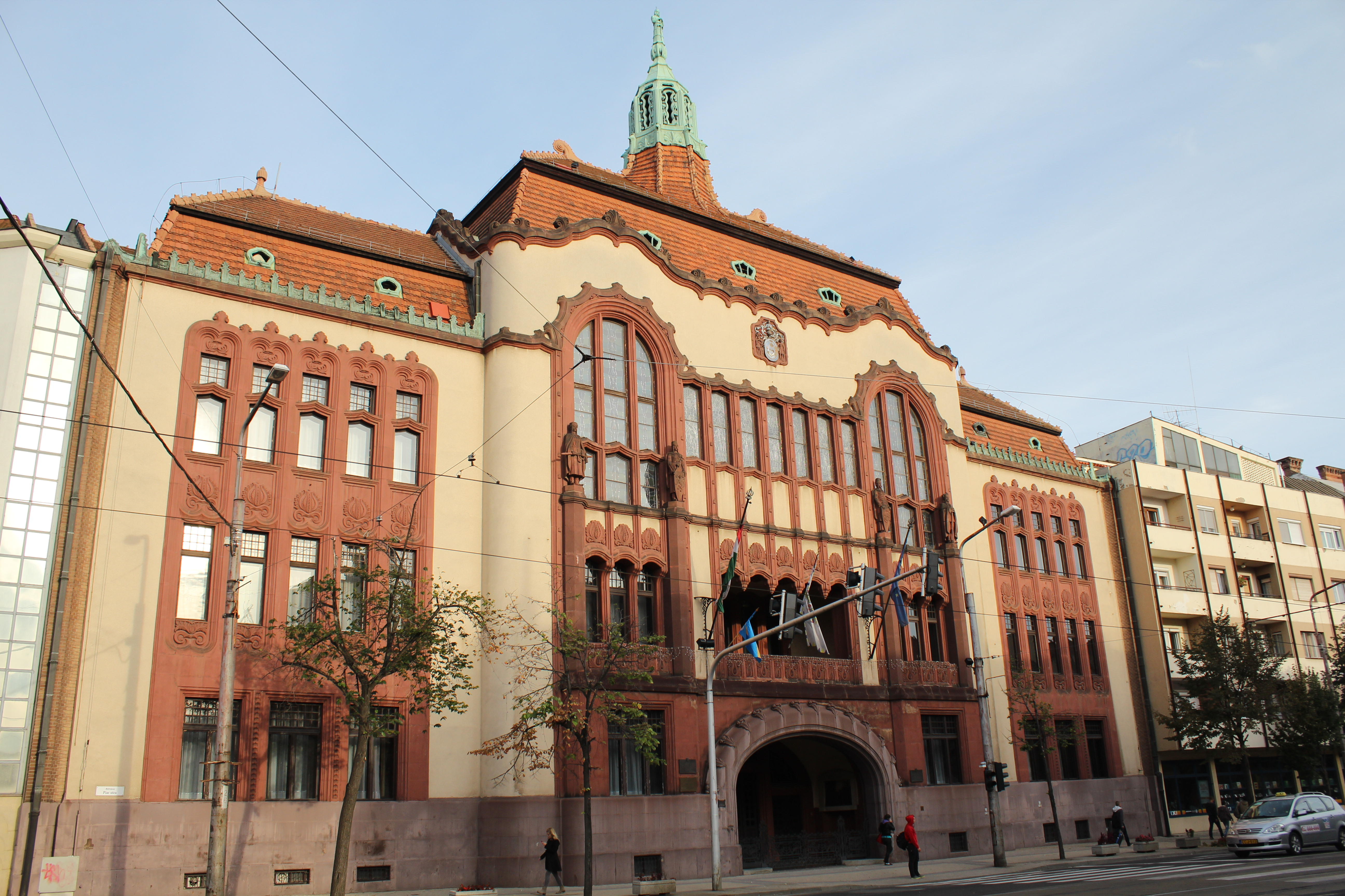 Vármegyeháza This is a photo of a monument in Hungary. Identifier: 5263